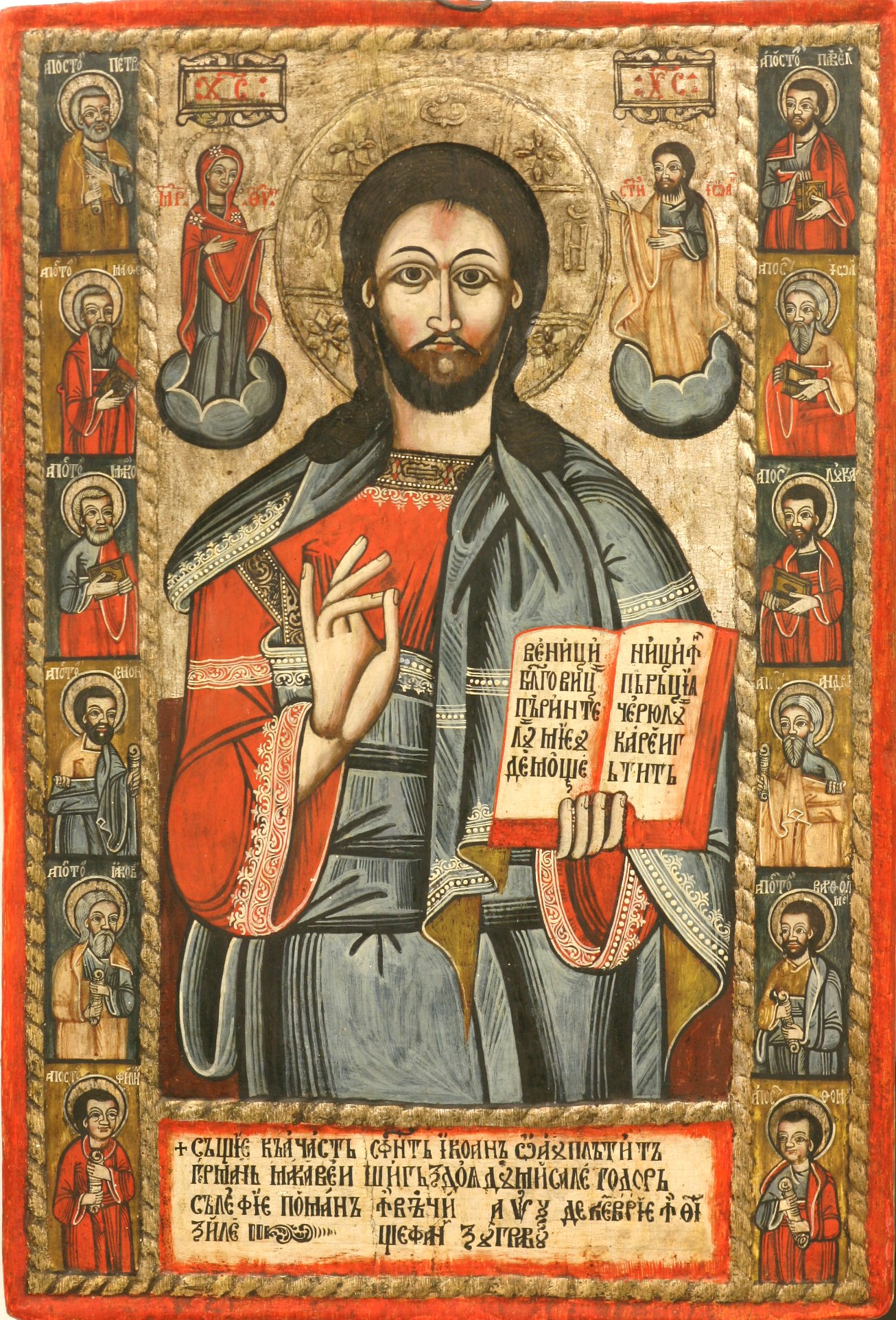 Icoana de lemn din Aruncuta , realizata in anul 1760 de Stefan Zugravu si achitata de sateanul Gherman Macavei si sotia Todora